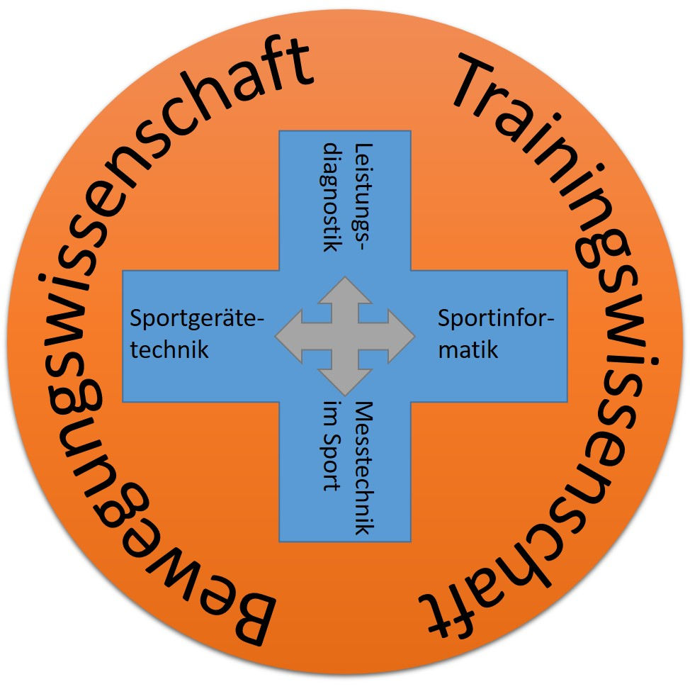 Die Abbildung beschreibt die Teilgebiete von Sport und Technik sowie deren Interaktion miteinannder